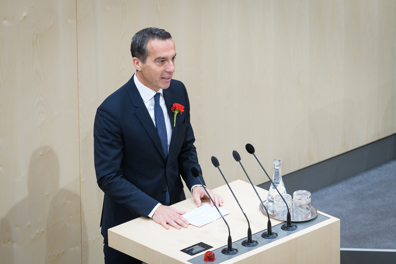 Konstituierende Sitzung des Nationalrats, 9. November 2017